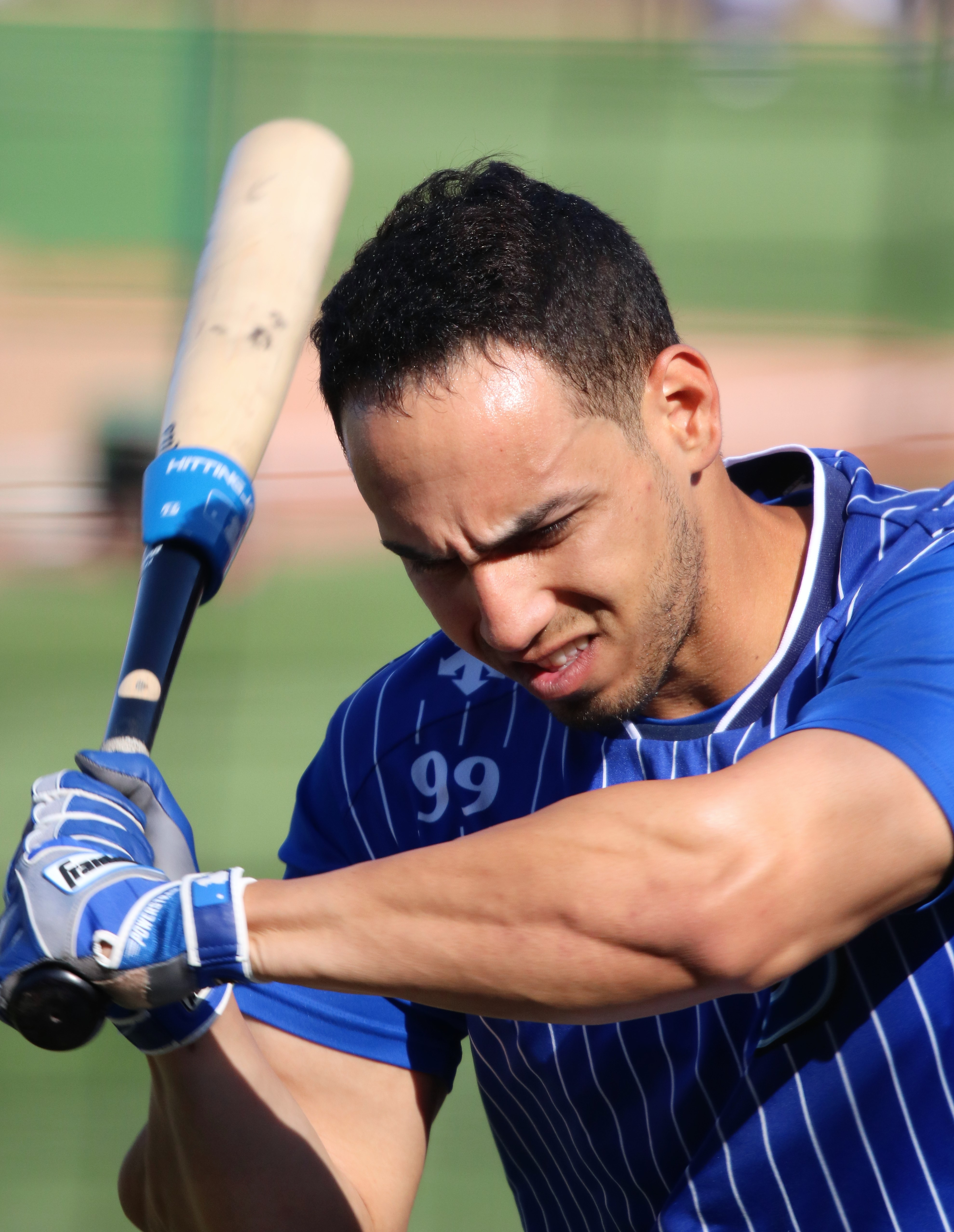 2018/5/9 マツダスタジアム